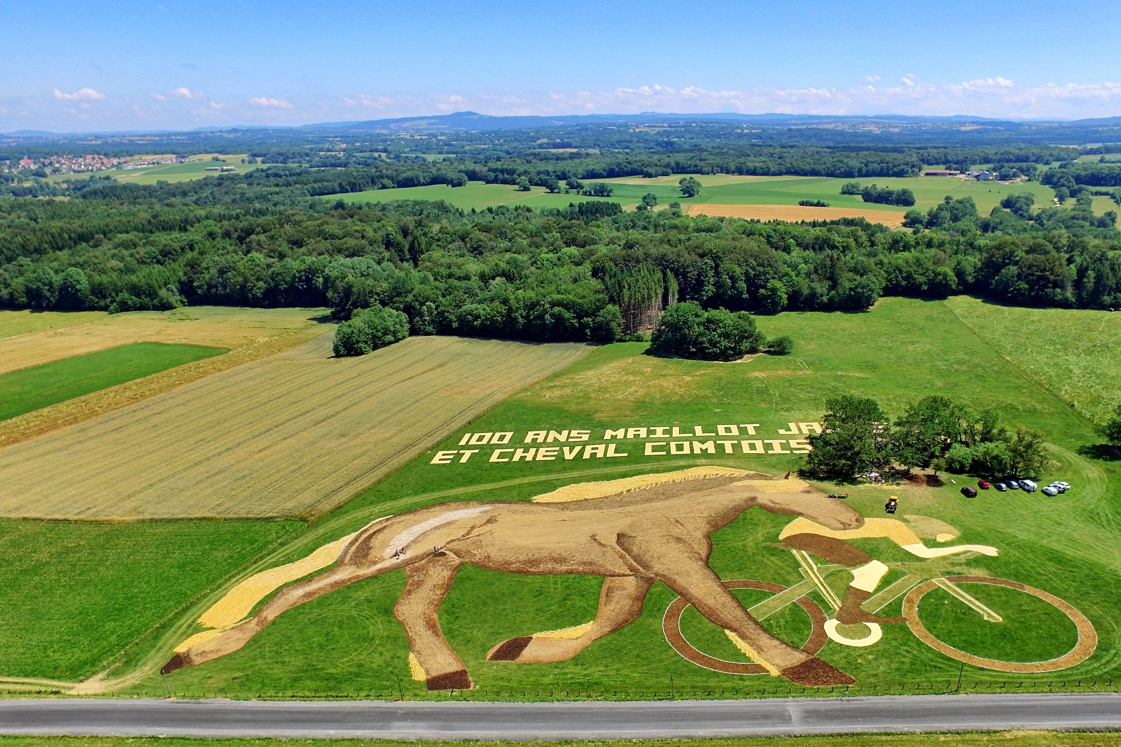 La fresque cheval comtois-cycliste réalisée pour le passage du Tour de France le 12 juillet 2019